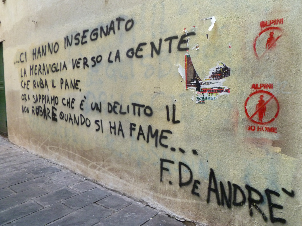 Scritta comparsa nei quartieri vecchi di Genova: "...Ci hanno insegnato la meraviglia verso la gente che ruba il pane. Ora sappiamo che è un delitto il non rubare quando si ha fame". A fianco, due scritte contro l'Adunata nazionale degli Alpini)"Alpini go home")